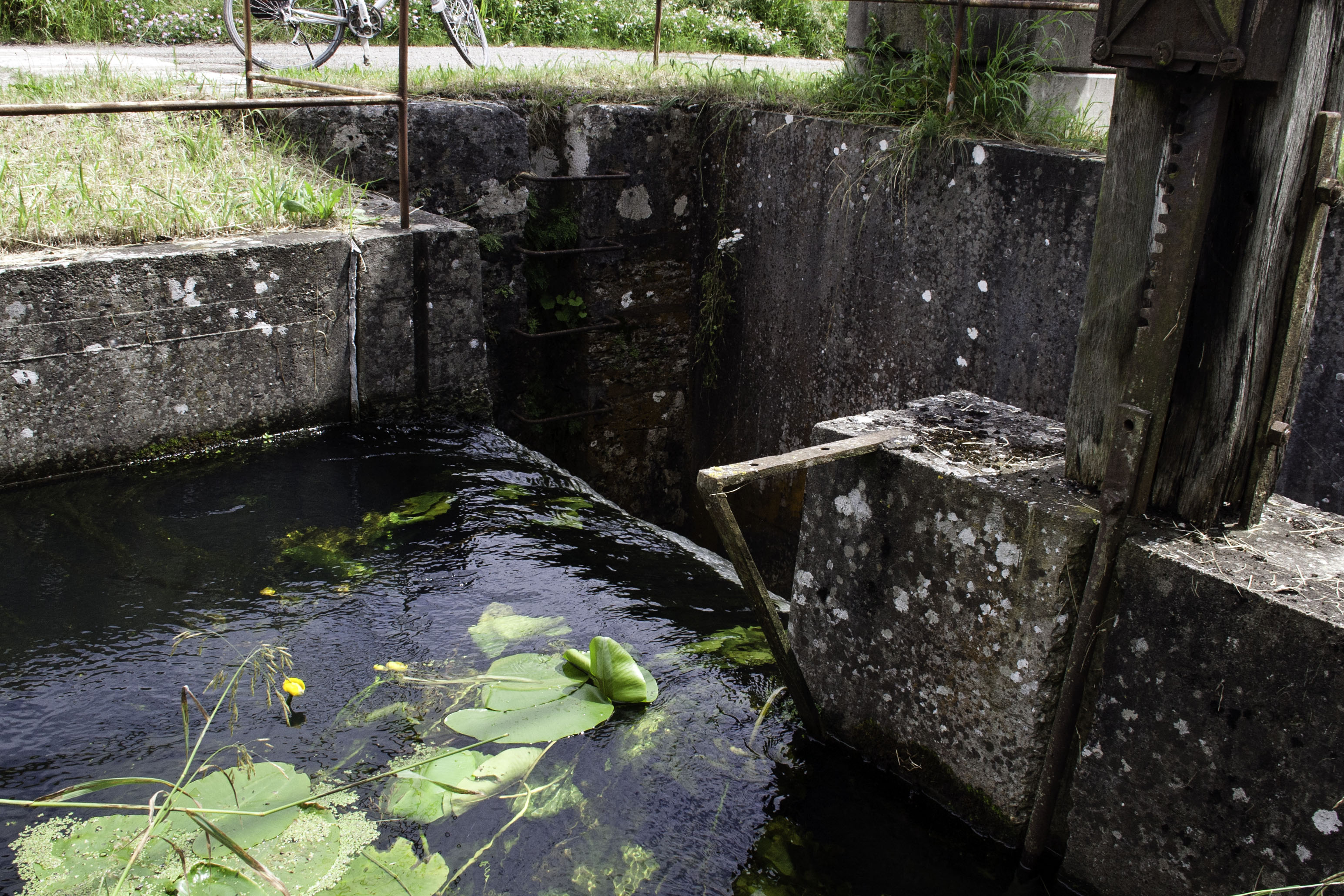 Schleuse 31, Ludwig-Donau-Main-Kanal